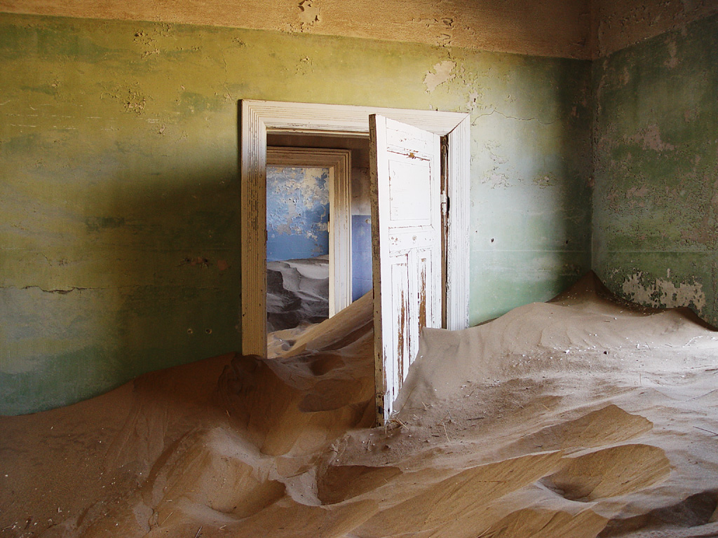 Kolmanskop ghost town